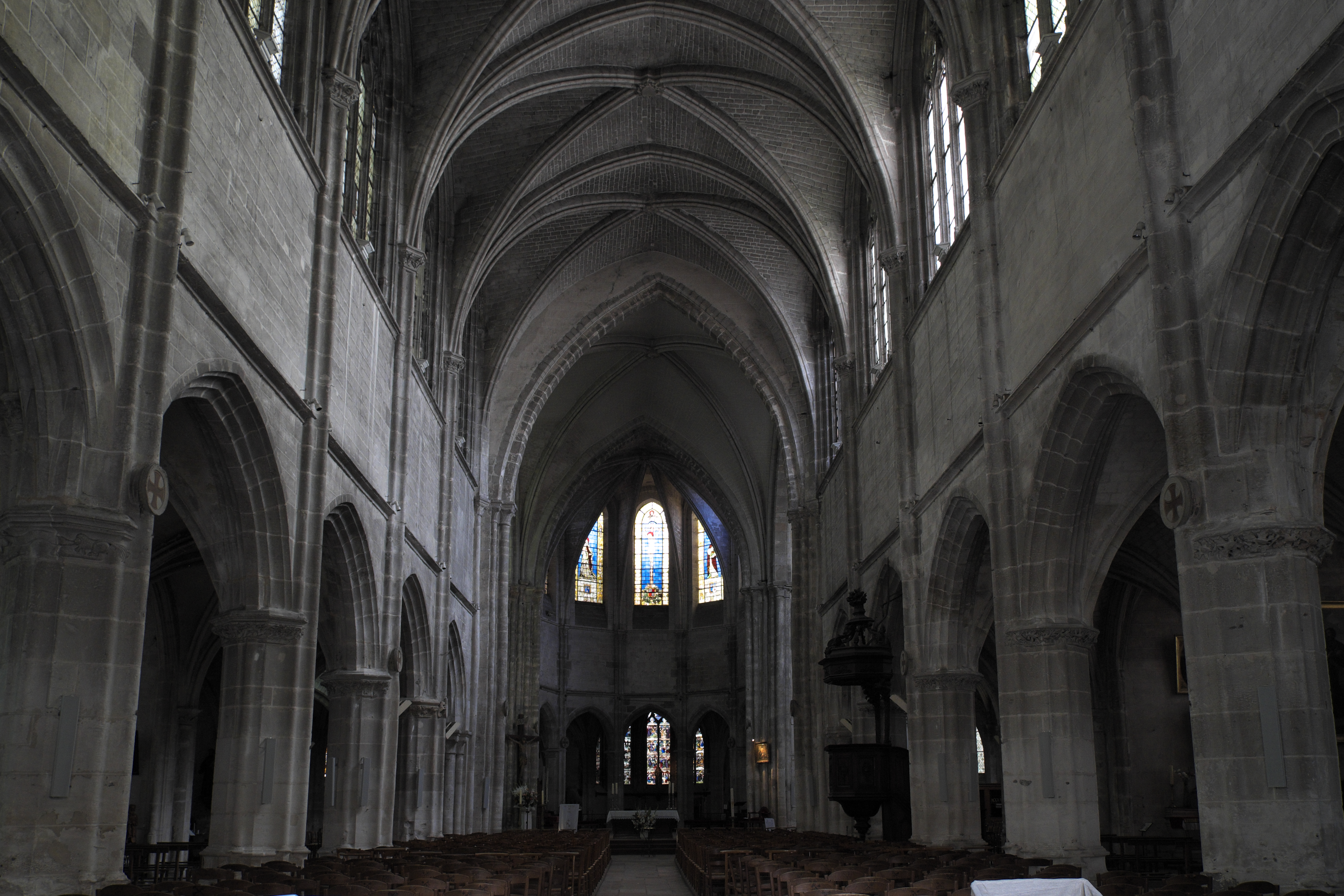 Katholische Kirche Saint-Pierre in Dreux im Département Eure-et-Loir (Centre-Val de Loire/Frankreich), Innenraum